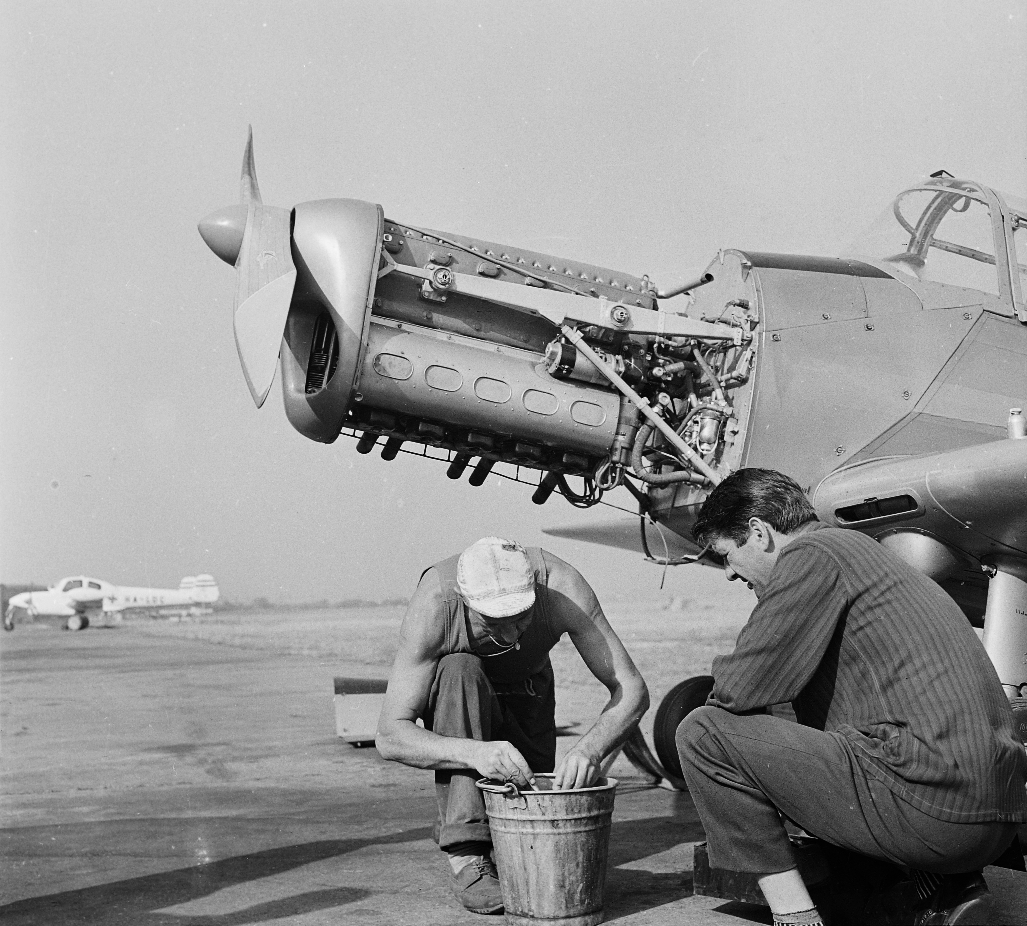 Zlin Trener típusú repülőgép. Háttérben az Országos Mentőszolgálat Morava L-200D típusú repülője. Location: Hungary, Budapest XI., Budaörs Airport Tags: Zlin-brand, airplane, airport, transport, Czechoslovak brand, Budapest Title: Zlin Trener típusú repülőgép. Háttérben az Országos Mentőszolgálat Morava L-200D típusú repülője.